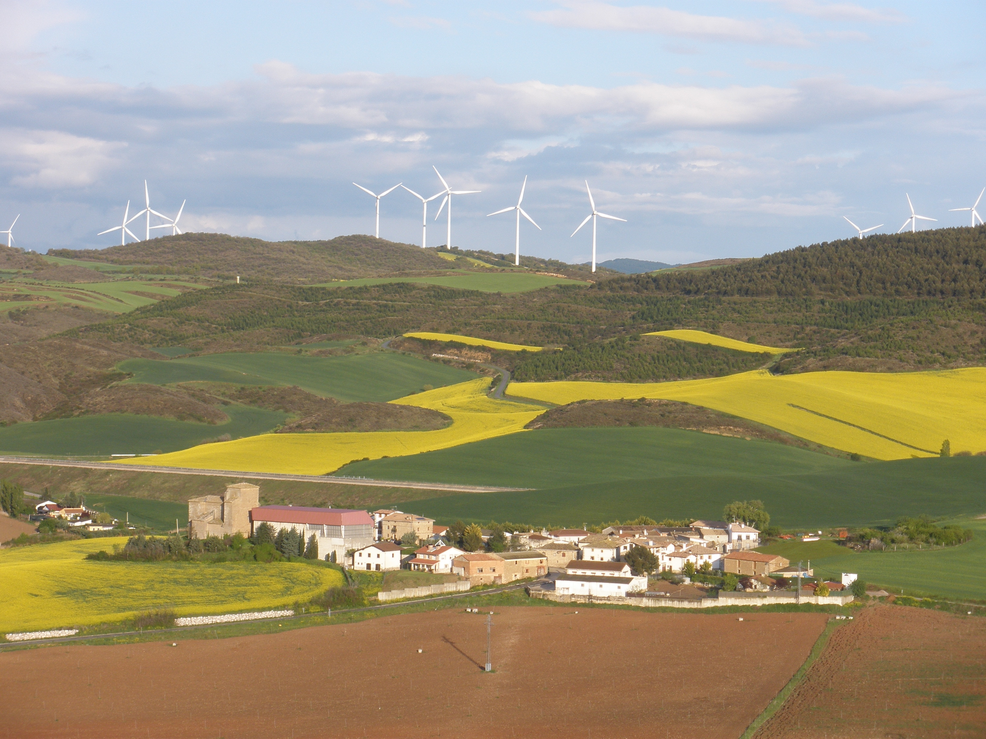 Vision del entorno y los molinos